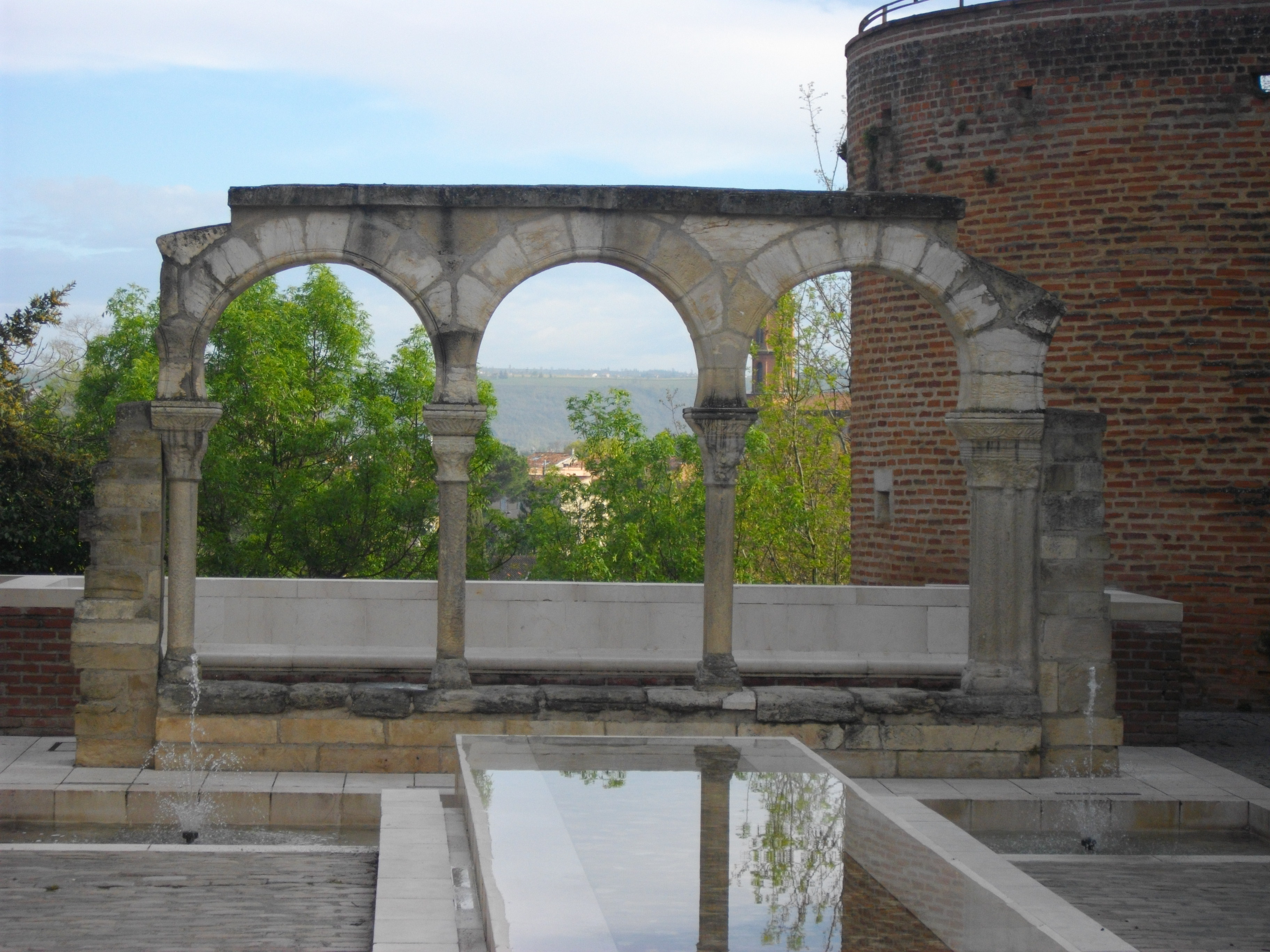 Arcs outrepassés du cloitre de l'ancienne cathédrale romane. A droite, une tour de l'enceinte médiévale, d'où partait aussi le mur des chanoines.